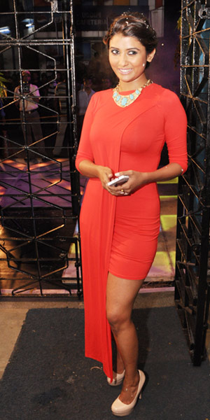 Premiere of Aami aar amar girlfriends